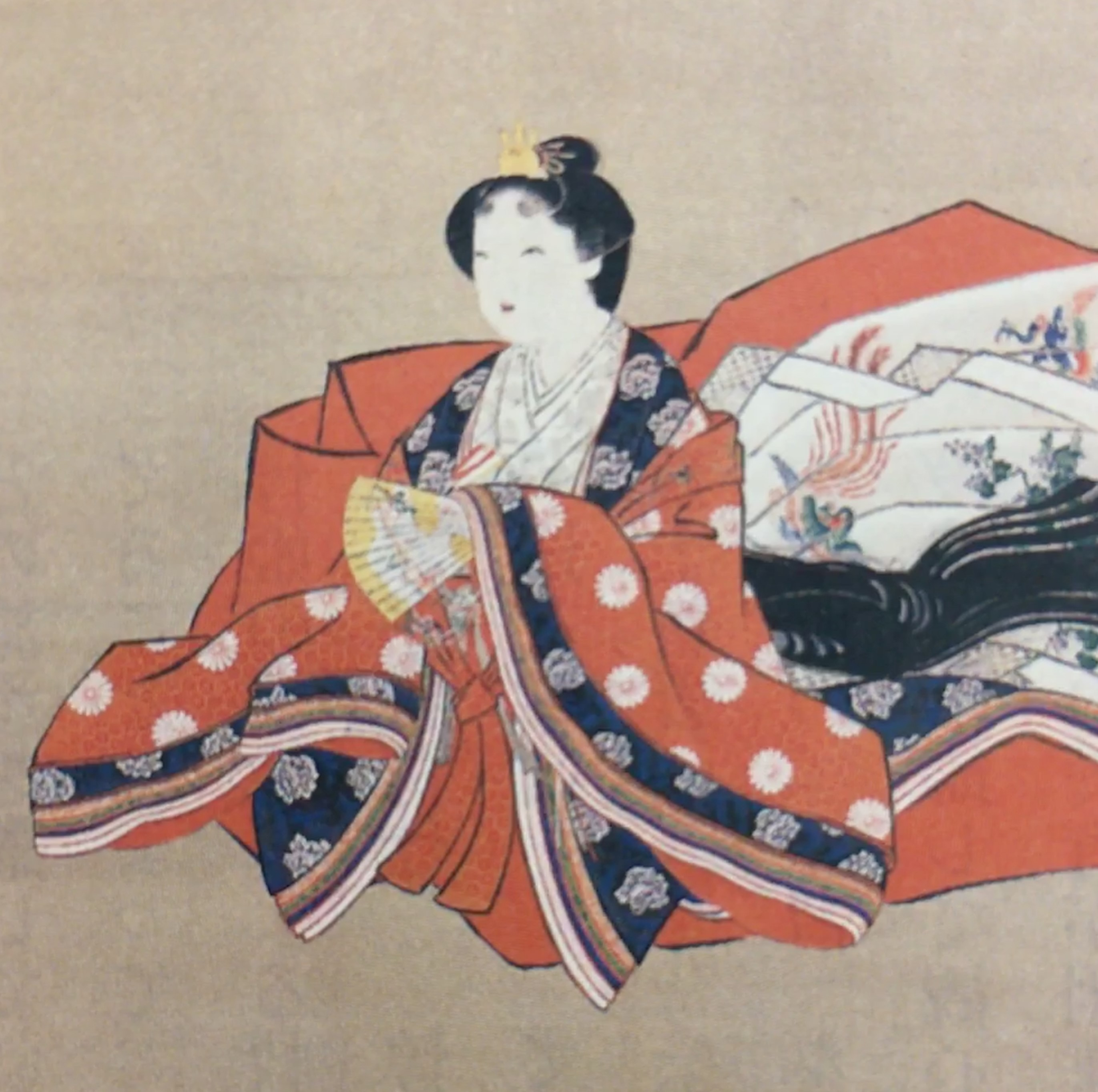 観心院(惇姫。広幡長忠の女、関白近衛内前養女、伊達重村の正室)の肖像。